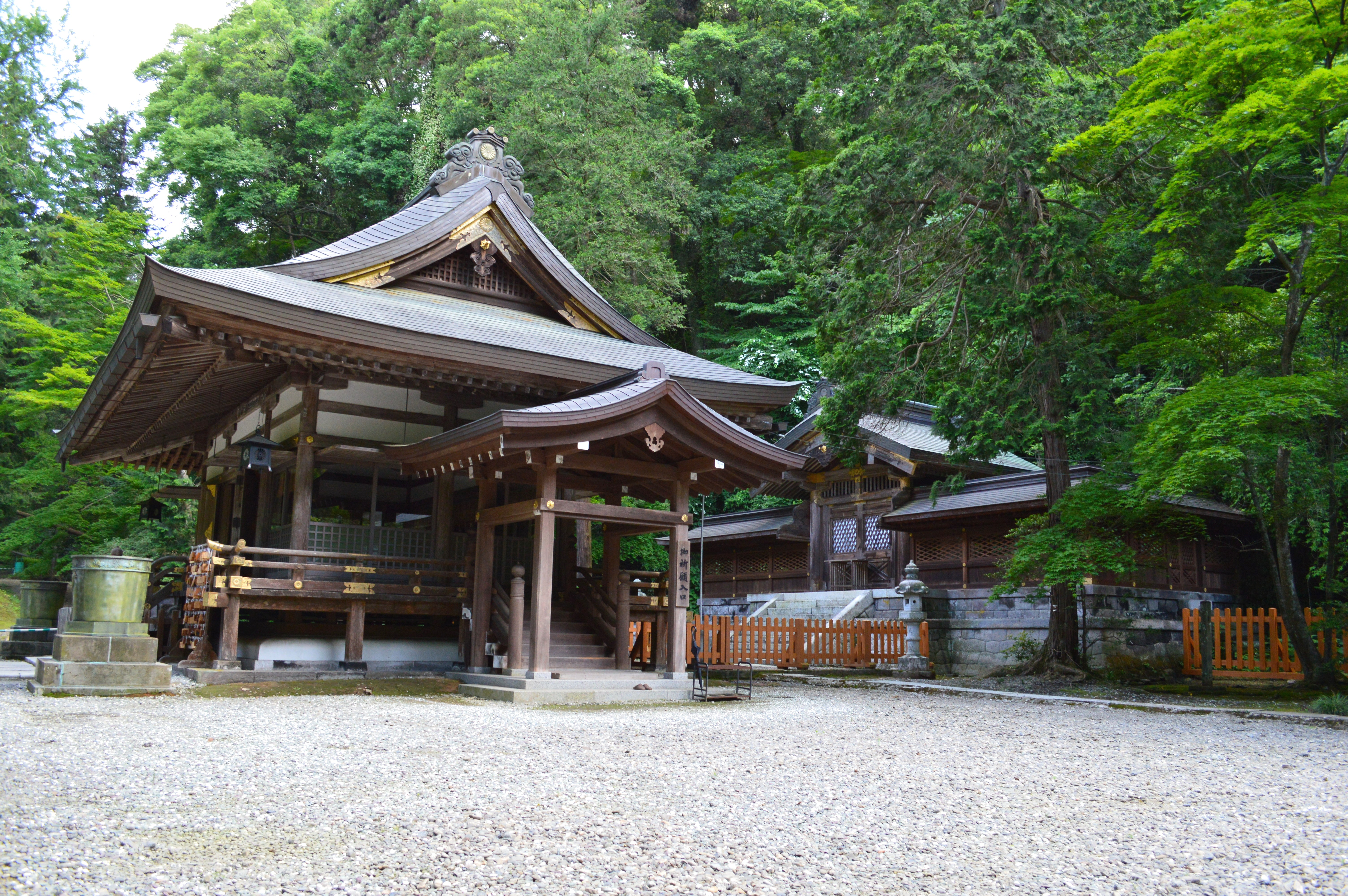 金鑚神社 境内